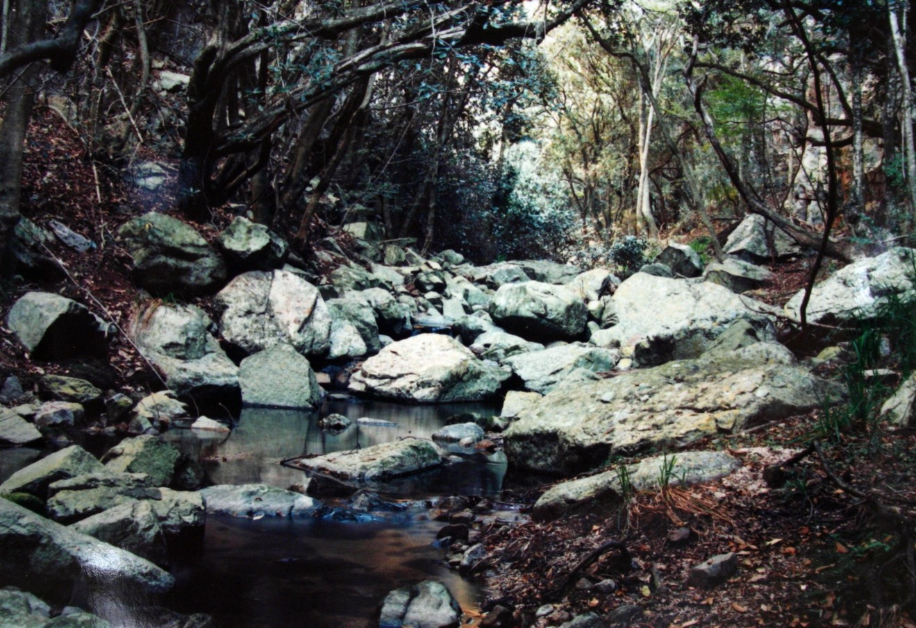 Hamerkop Kloof in Magaliesberg, South Africa